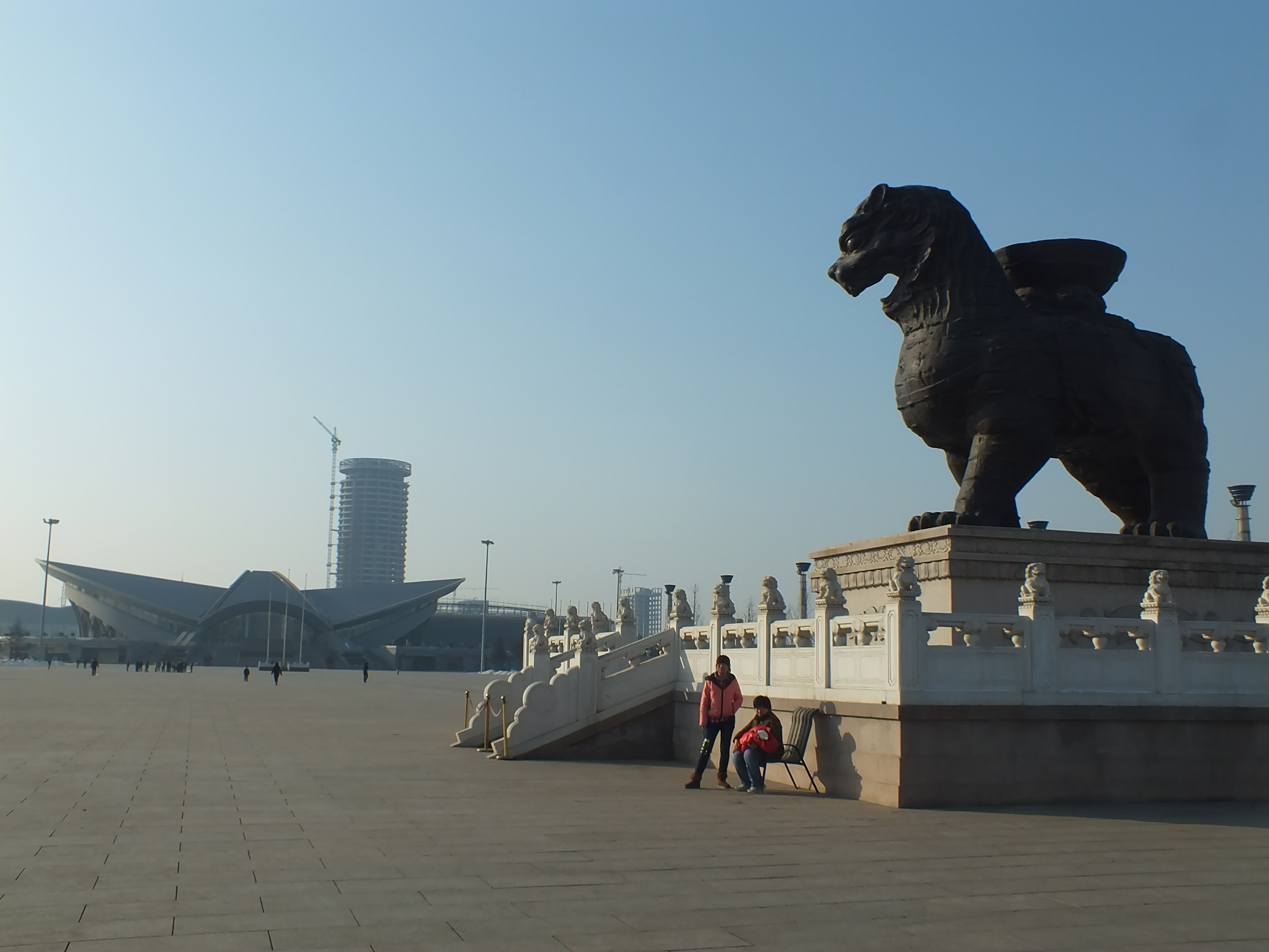 狮城广场 铁狮子